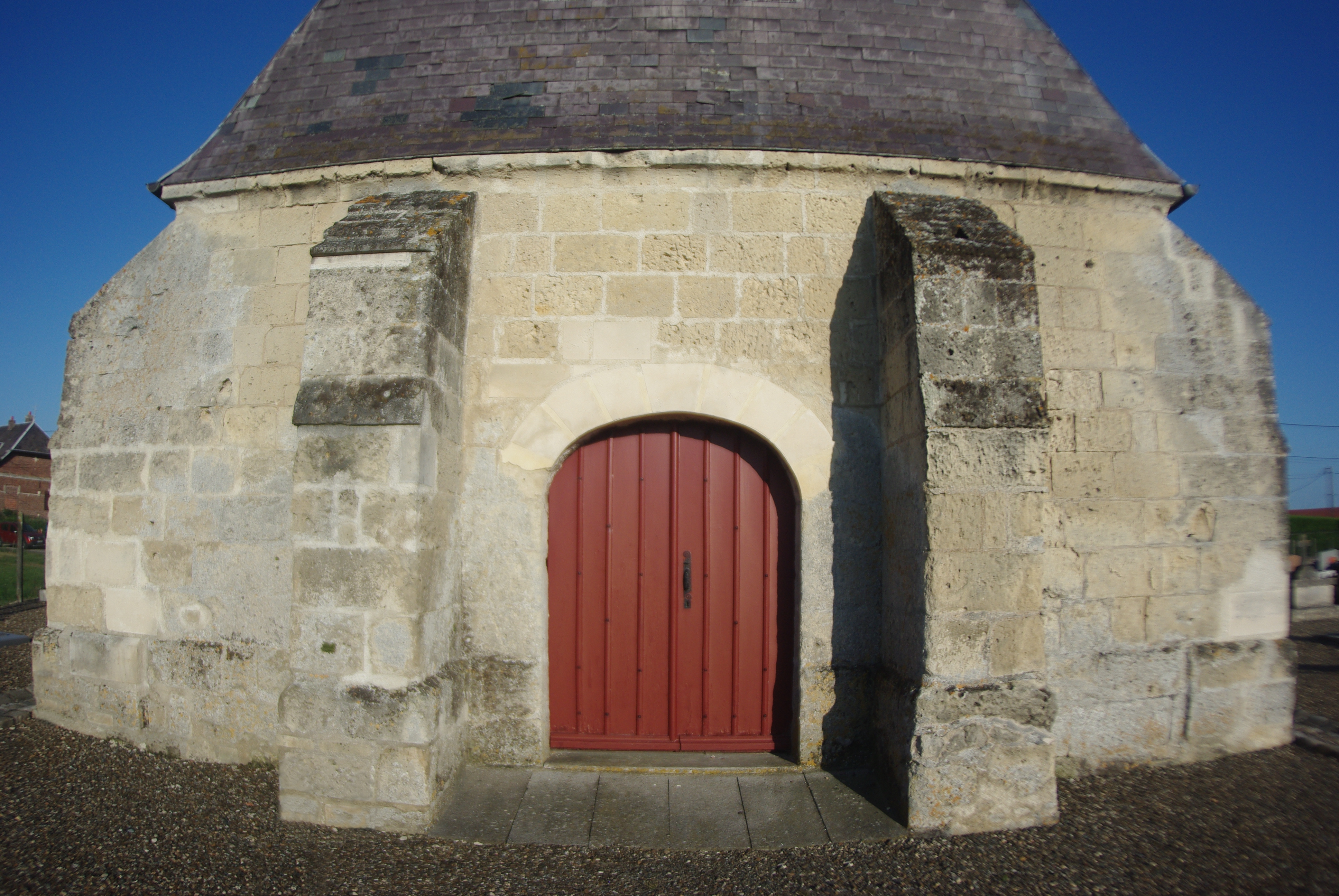 Église en pierre dont la nef date du 12e siècle et le chœur du 16e siècle. La voûte est lambrissée. L'église possède des fonts baptismaux de style roman, une statue de saint Denis en bois polychrome du 14e siècle, une statue de sainte-Barbe datée du 16e siècle ainsi que celle de saint Sébastien. Un Christ de l'école espagnole du 16e siècle orne le transept sud. Elle a subi d'importants dommages lors de la guerre de 1914-1918, les vitraux du 16e siècle qui ornaient le chœur ont été détruits. .